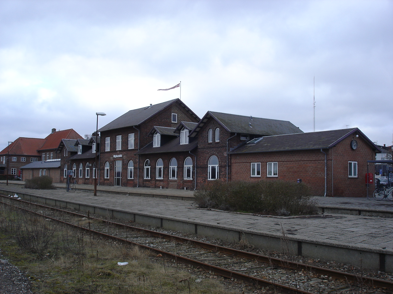 Grenaa Station fra sporsiden